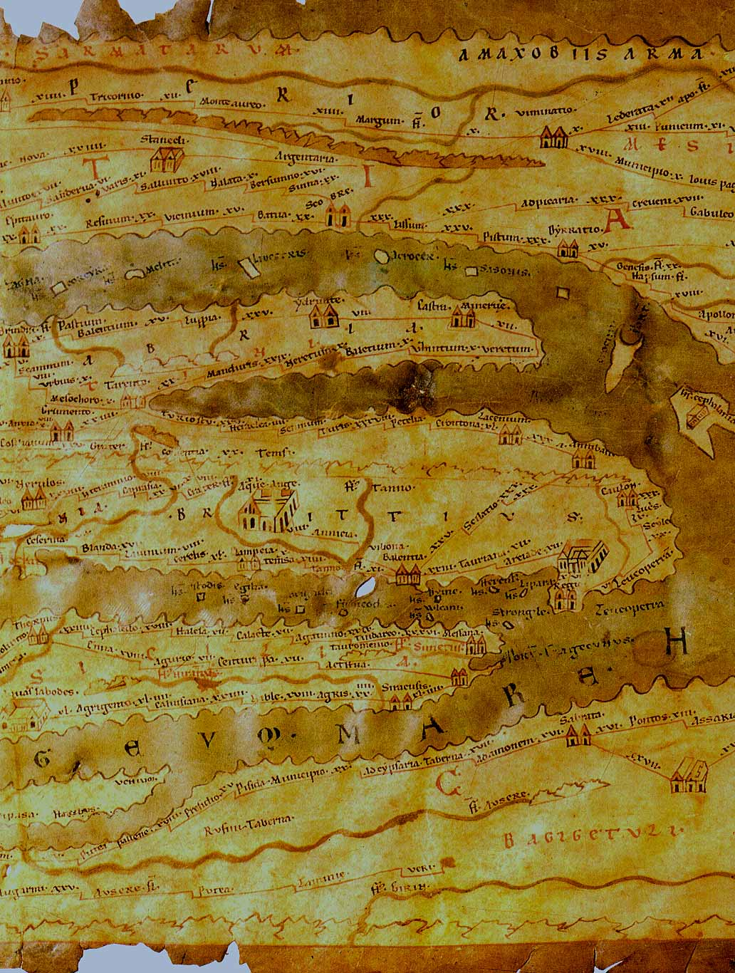 Tabula Peutinger, Segment VII